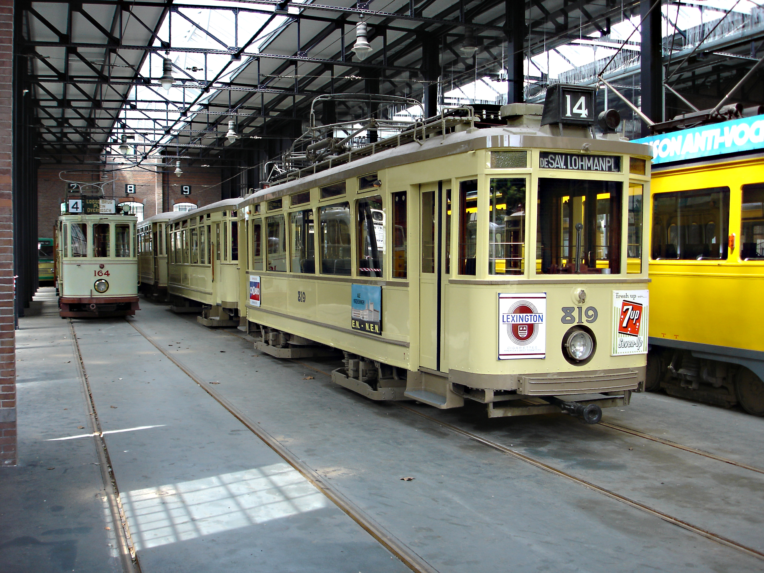 Motorwagen 819 in de remise Frans Halsstraat